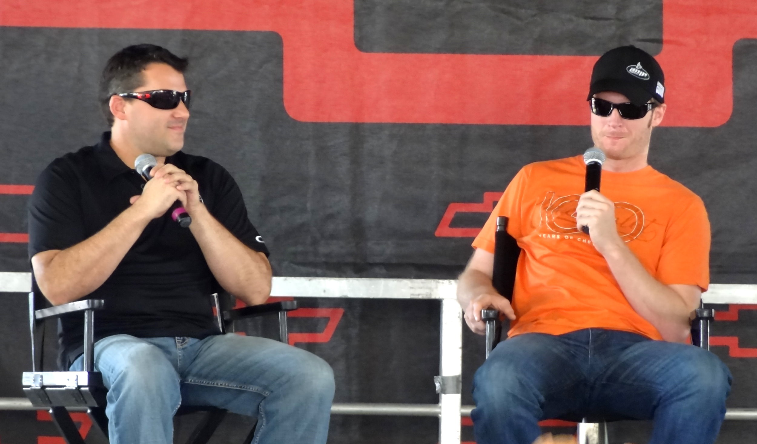 Stewart und Earnhardt Jr. beim Fan-Meeting von Chevrolet.